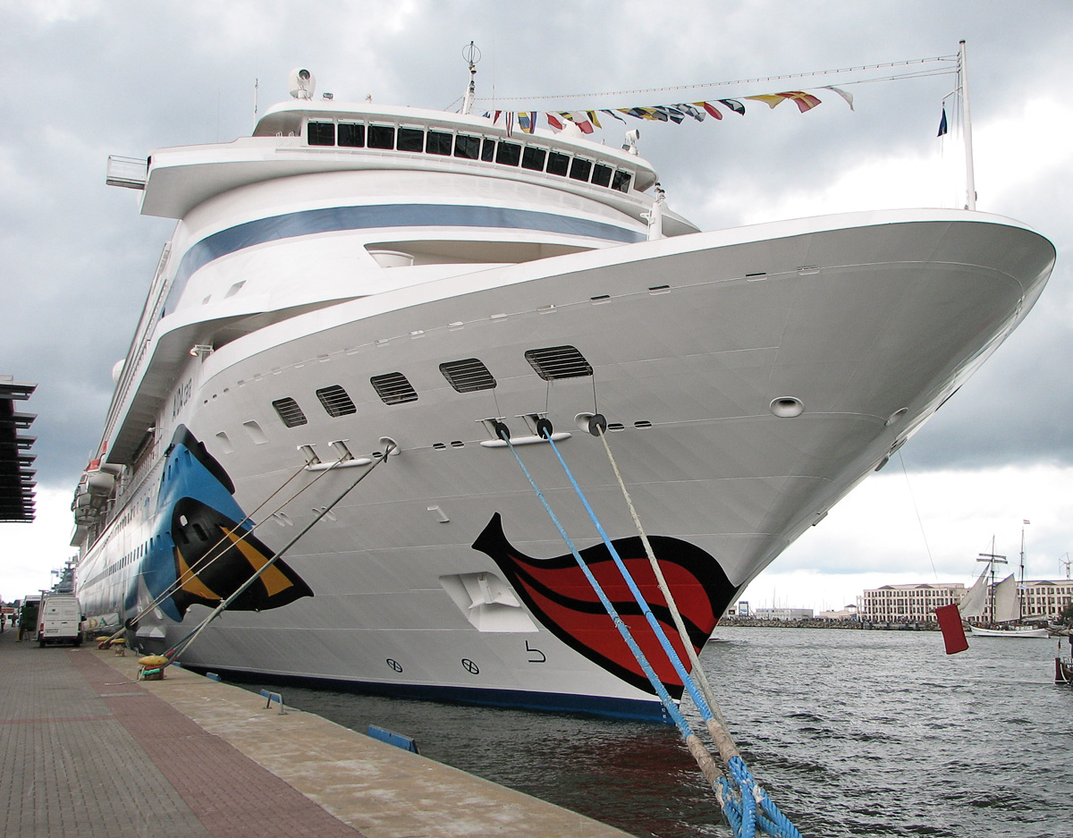 Beschreibung: AIDAcara in Warnemünde zur Hanse Sail 2005 IMO Number: 9112789 MMSI Number: 247117300 Callsign: IBNR Length: 193 m Beam: 32 m Fotograf: Darkone, 13. August 2005